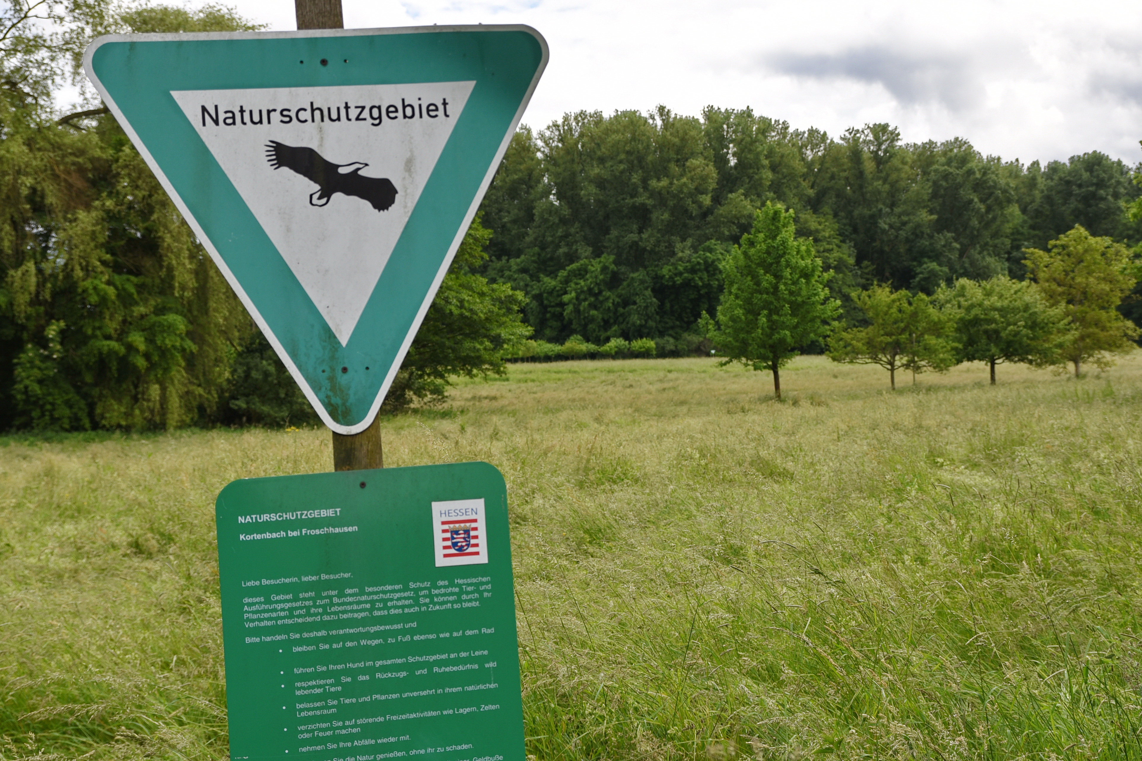 Im Süden von Froschhausen, einem Stadtteil von Seligenstadt, liegt das Naturschutzgebiet zwischen der Autobahn A3, der Landesstraße L2310 und dem Golfplatz des „Golfclubs am Kortenbach“ im Naturraum östliche Untermainebene.